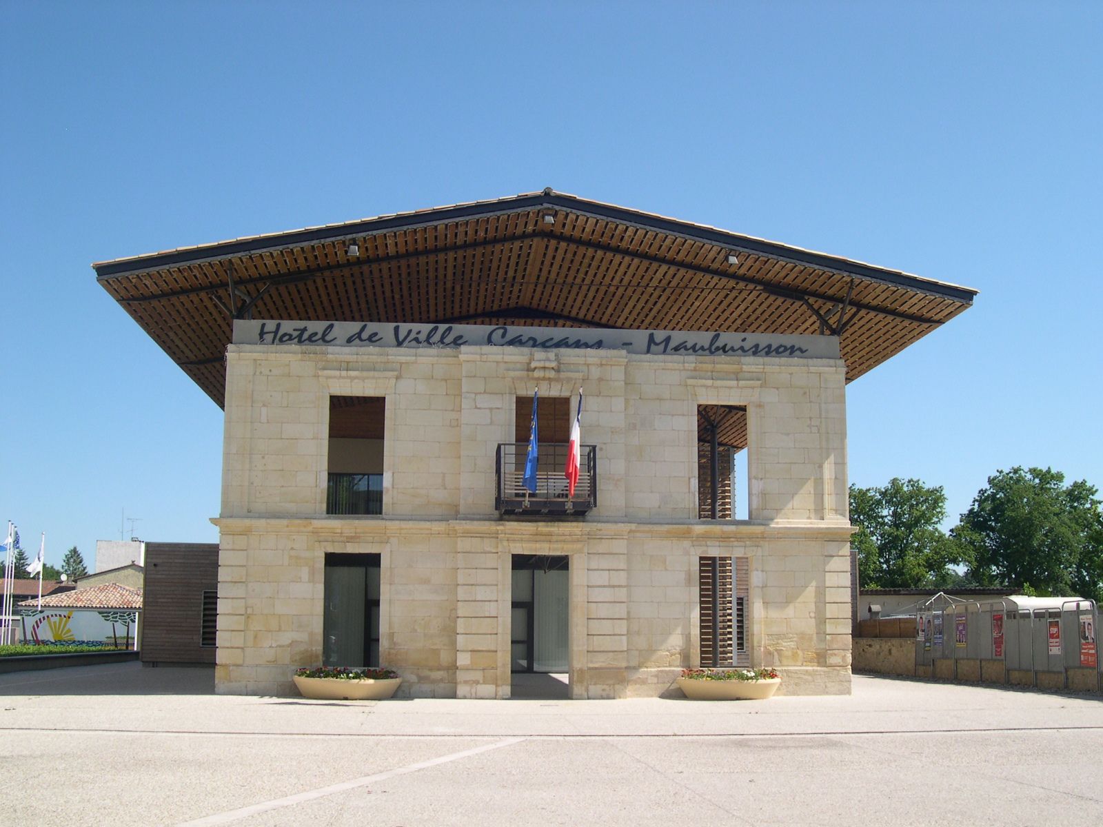 Le nouvel hôtel de ville de Carcans-Maubuisson